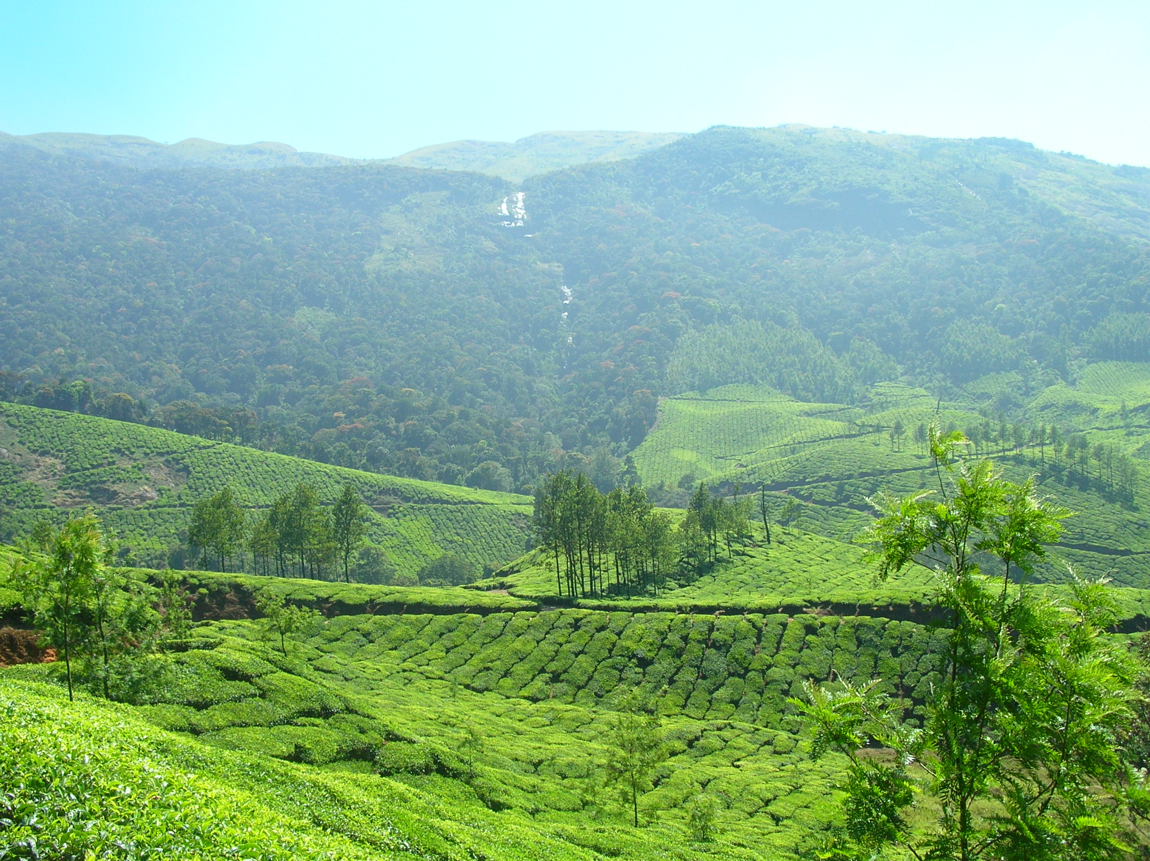 Munnar